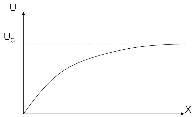 Va avec l'autre schéma "Traversée simple"